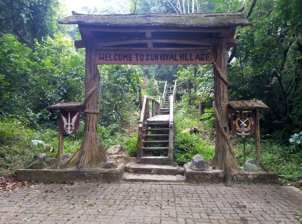 Pintu gerbang ke Perkampungan Ikhtiar Hidup 8 RRD (Para)